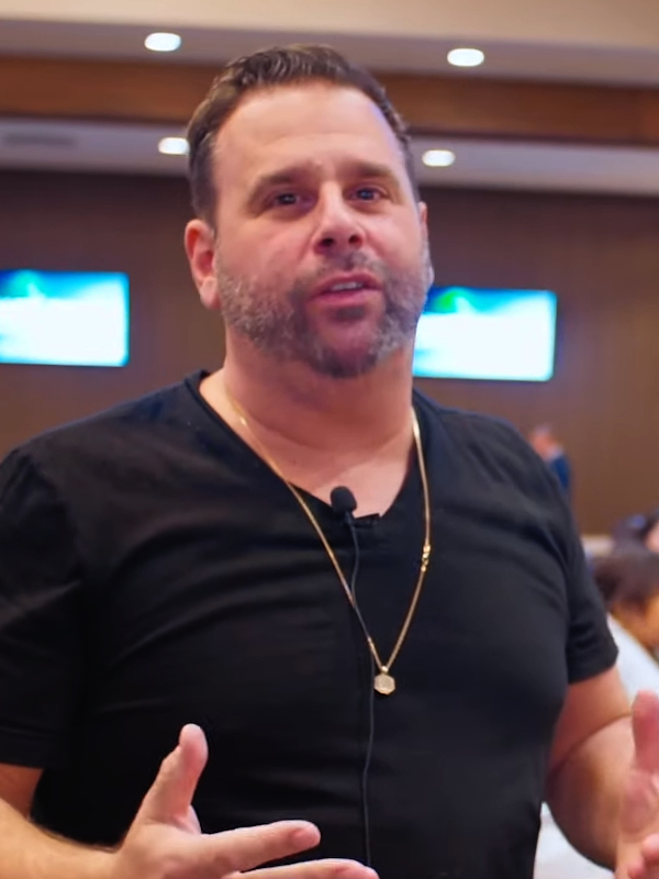 Randall Emmett bei der WPT Gardens